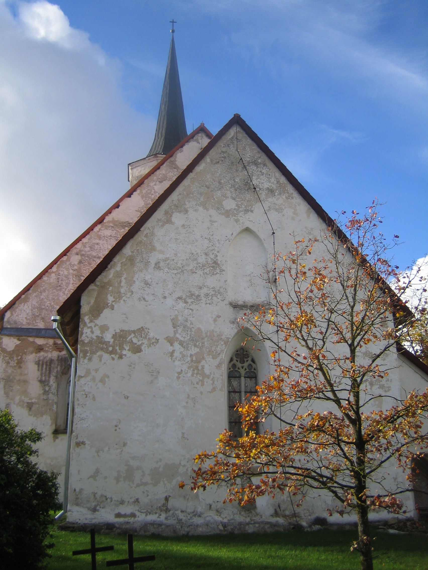 Haljala kirik tagantvaates